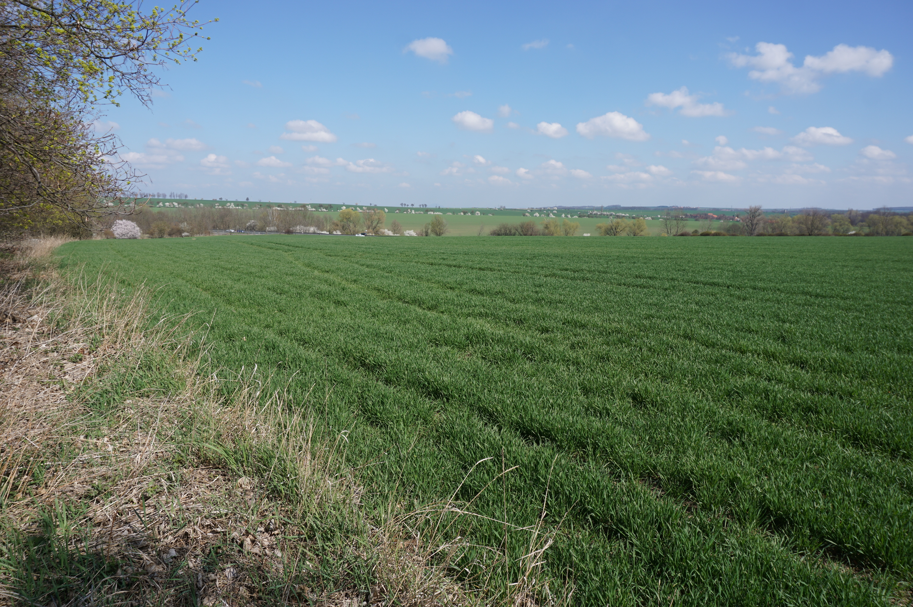 Kultovní místo, východně od obce, Makotřasy.